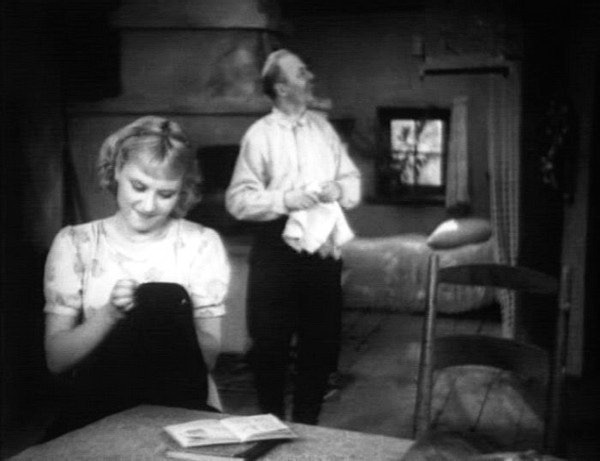 Кадр из фильма Аринка (фильм)